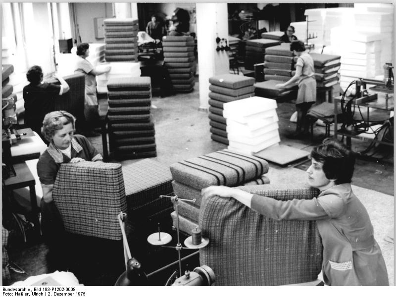 Oelsa-Rabenau, Möbelfabrik, Polsterei ADN-ZB Häßler 2.12.75 Bez. Dresden: Sanfte Polsterkissen und ein gutes Gewissen in punkto Intensivierung gehören für die Werktätigen des VEB Vereinigte Polstermöbelindustrie in Oelsa-Rabenau, Kreis Freital, eng zusammen. Rund 300 (300) Arbeitsplätze, darunter die von Brigadeleiterin Christel Teumer (r) und der 1.Polsterin Gerda Peck, wurden seit Jahresbeginn durch wissenschaftliche Arbeitsorganisation neu- und umgestaltet. Dadurch konnten Reserven für die zusätzliche Produktion von 1000 (1 000) Polstermöbelgarnituren erschlossen werden. Auch der hohe Anteil an zeit- und kraftaufwendiger Handarbeit konnte gesenkt werden.